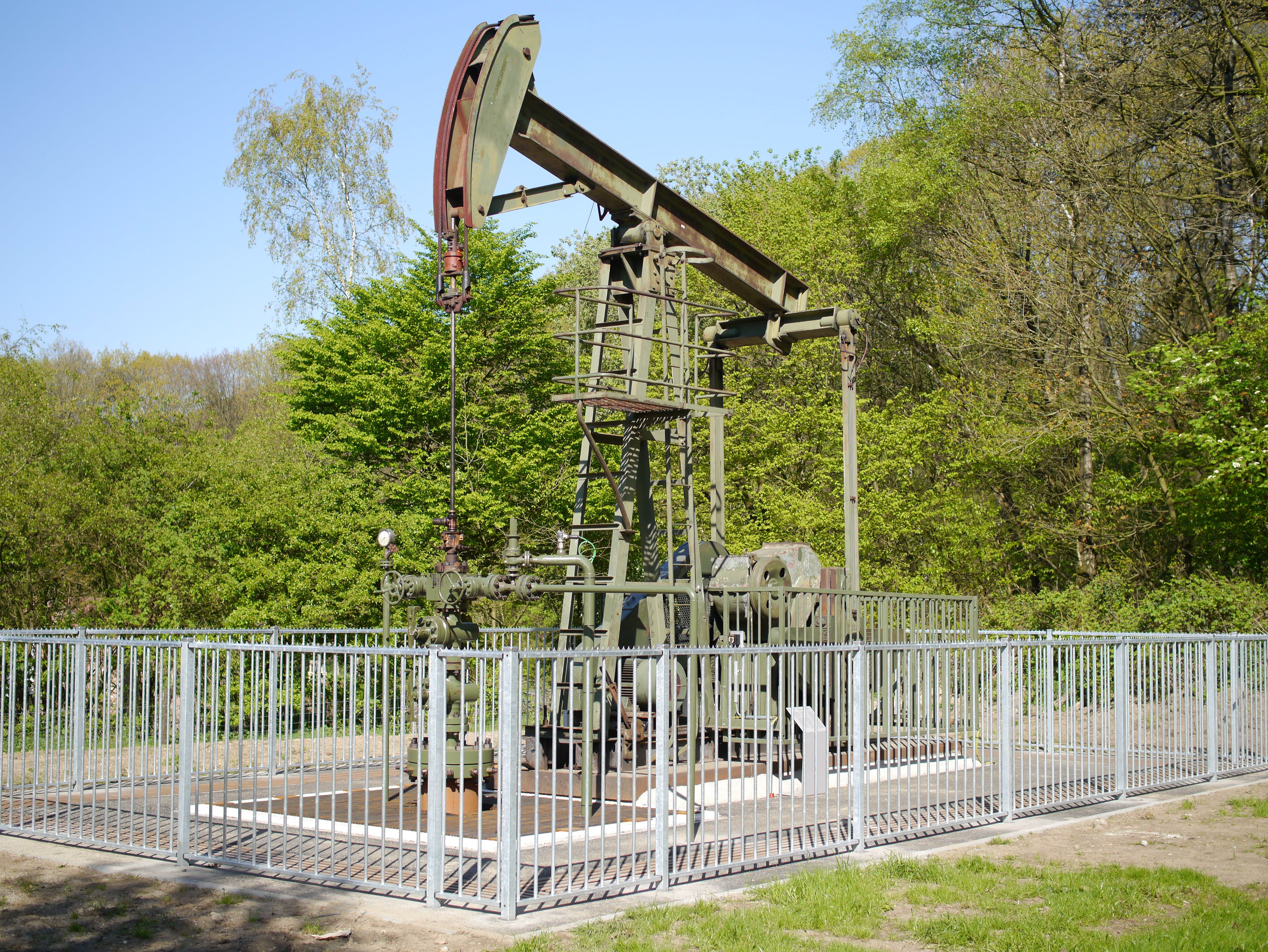 Ja knikker, Rotterdam - Openluchtmuseum Arnhem